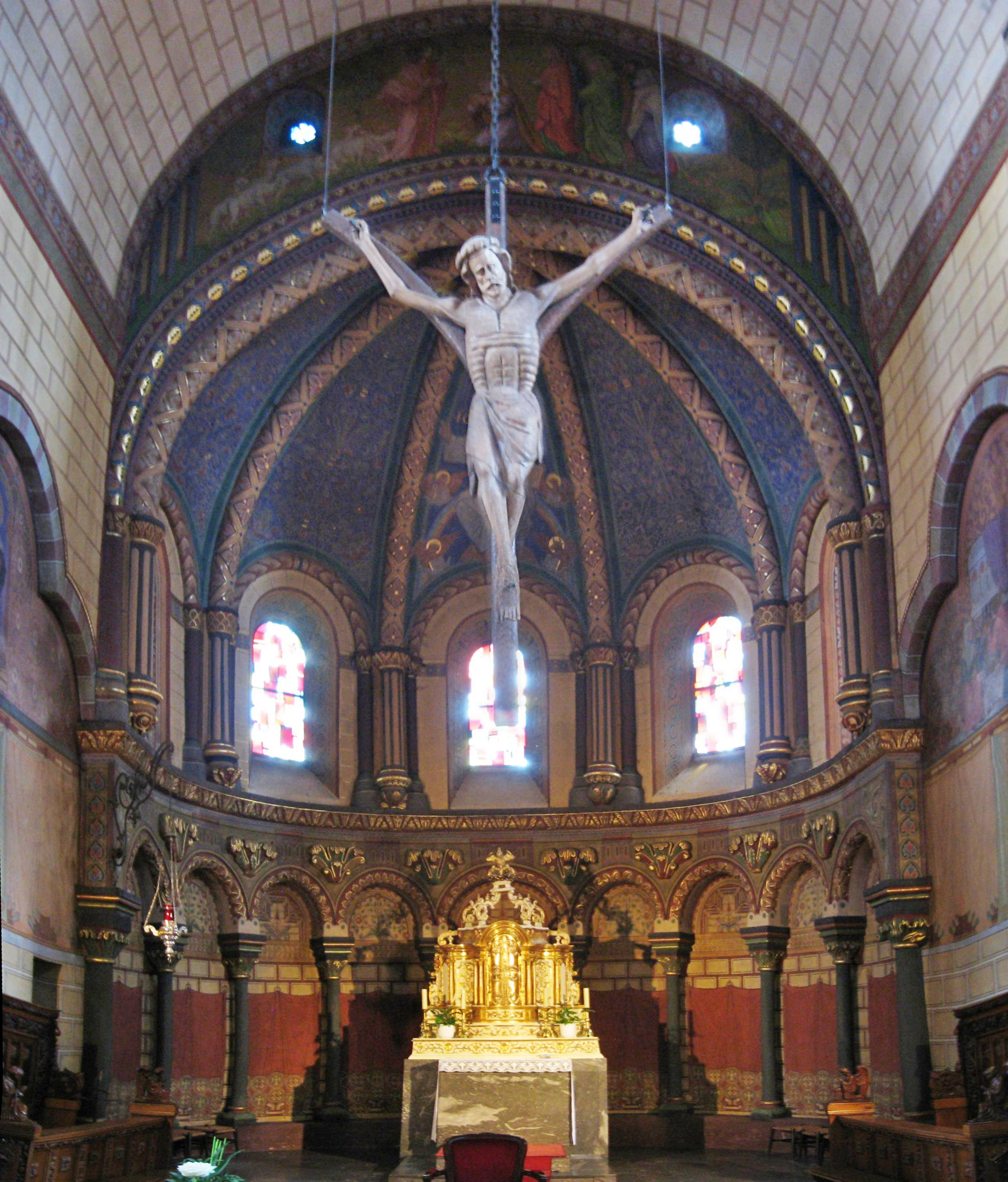 Chor von St. Peter Merzig